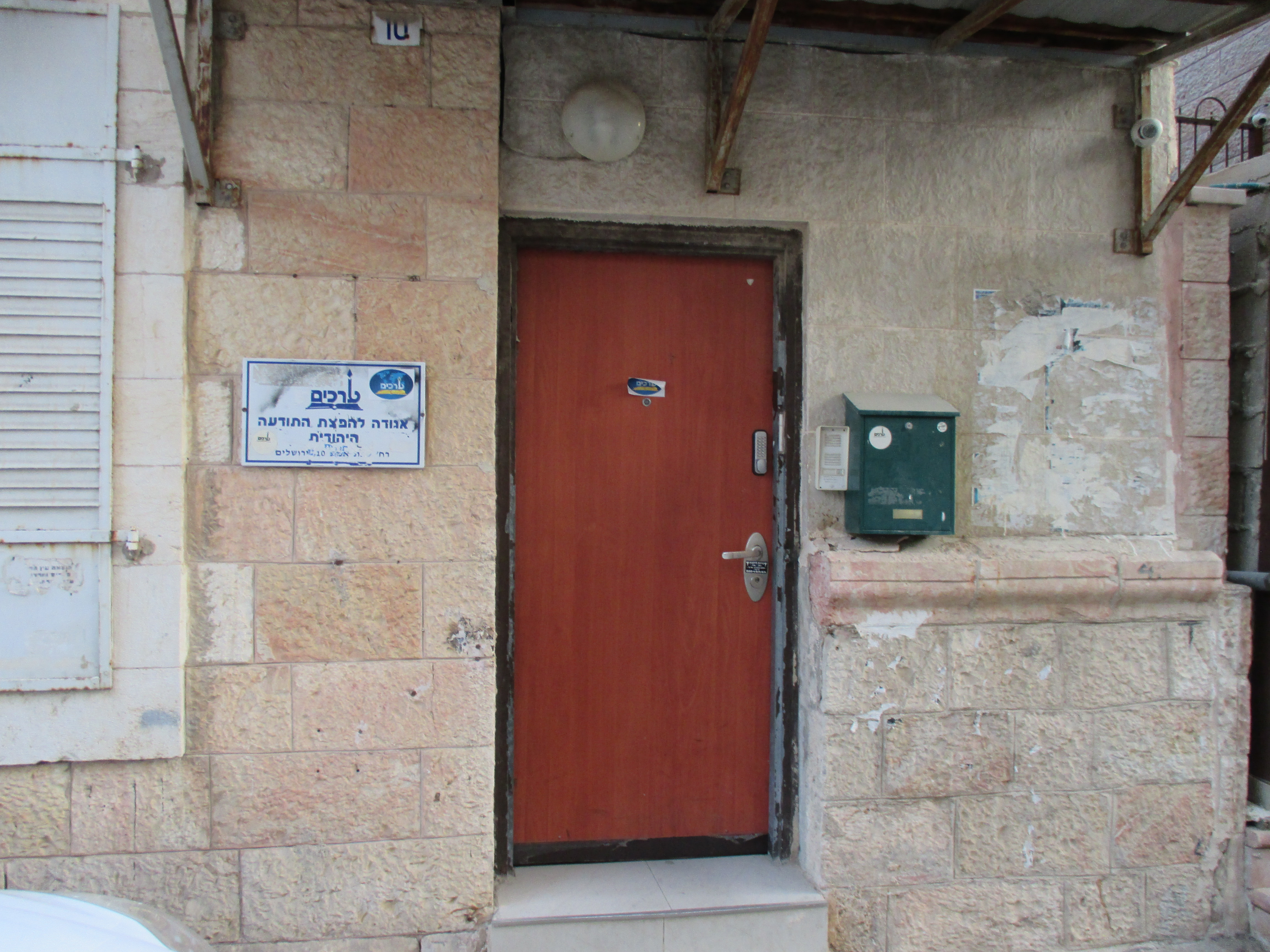 משרדי ארגון ערכים ברחוב שפת אמת בירושלים.